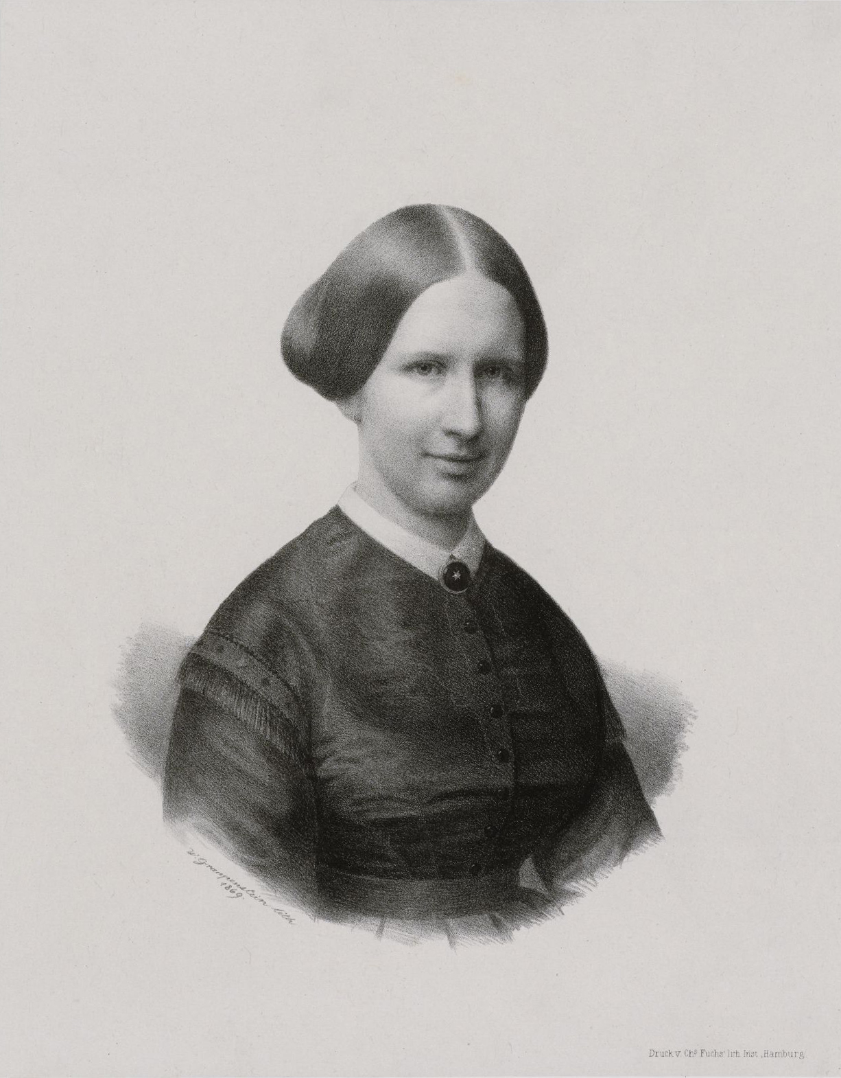 Porträt Theres Behn, geborene Sieveking